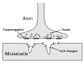 Schema einer motorischen Endplatte Die motorische Endplatte ist die Verbindungsstelle eines Nervs mit einer Muskelzelle. Es ist das Axon des Nervs mit Vesikeln und Freisetzungsstellen für Acetylcholin dargestellt. Unten das Schema der Muskelzelle mit Krypten und Rezeptoren. Zwischen beiden ist der synaptische Spalt.